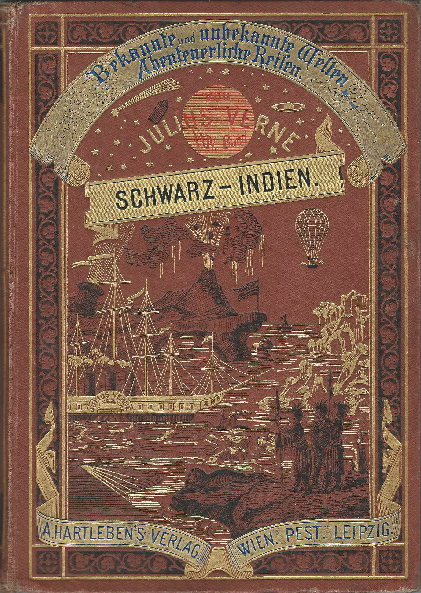 Jules Verne Fekete Indiák c. regénye német nyelvű 1878-as Hartleben-féle kiadásának a borítója